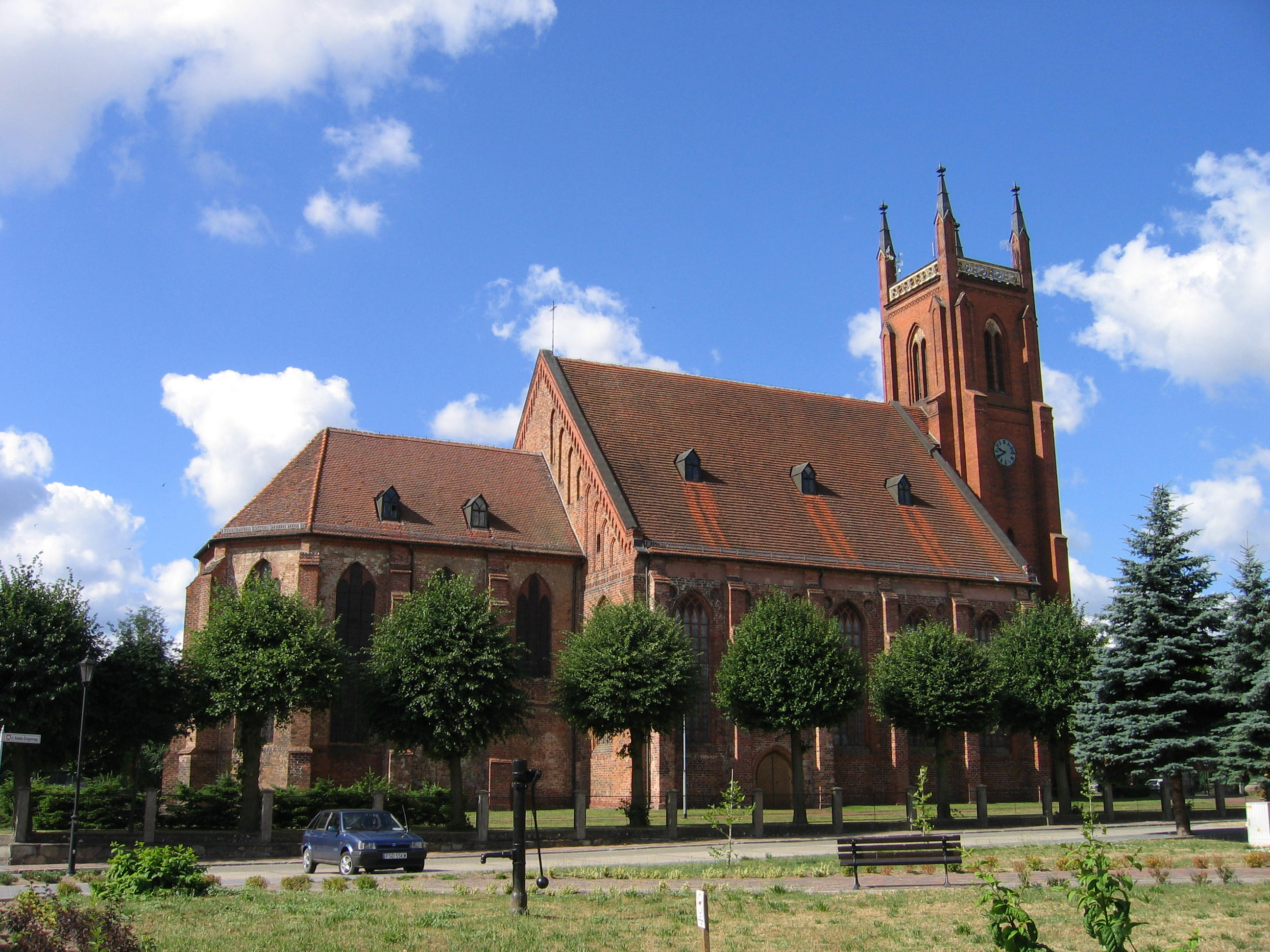 Kościół parafialny pw. Chrystusa Króla z 1. połowy XV, XIX w. w Dobiegniewie